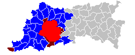 Arrondissement Brussel-Halle-Vilvoorde Blauw: Arrondissement Halle, Rood: Brussel; Bruin: Faciliteitengemeenten in Vlaams-Brabant